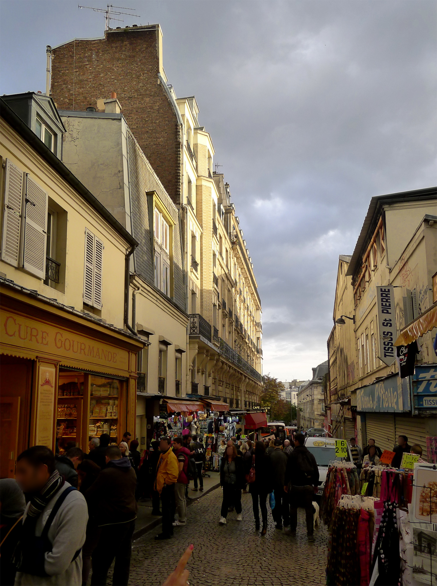 Rue de Steinkerque - Paris XVIII